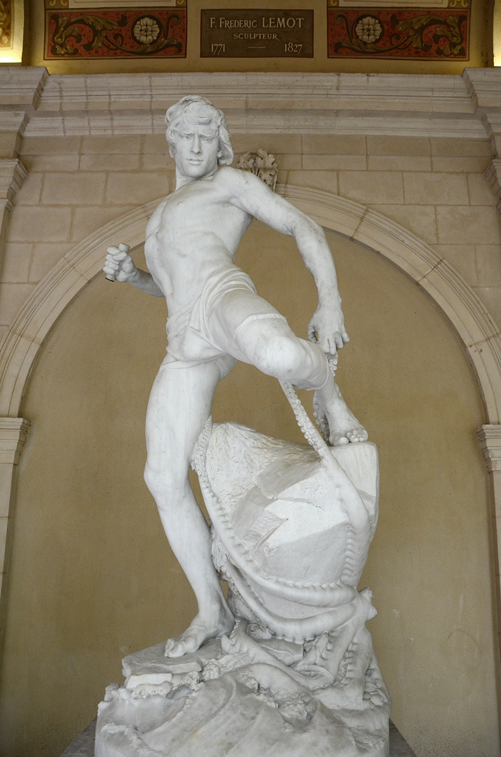 Gilliatt et la pieuvre (1880-1890), Émile Joseph Carlier (Cambrai 1849 ; Paris, 1927), marbre gris à veines sombres ; au revers du rocher : E.J. Carlier, de Cambrai 1890 ; devant en relief sur la plinthe : GILLIAT